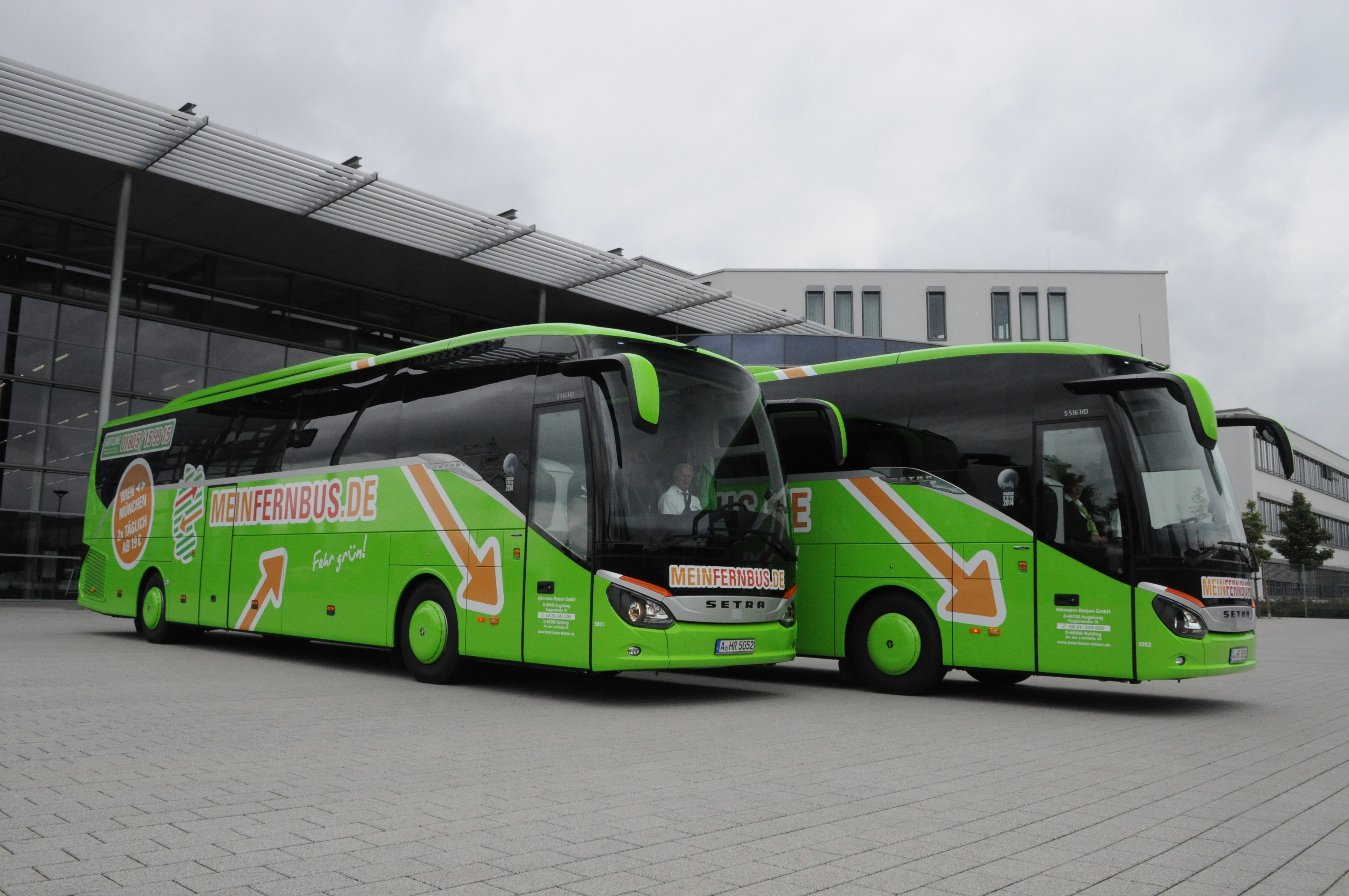 Mein Fernbus mit Hörmann-Reisen